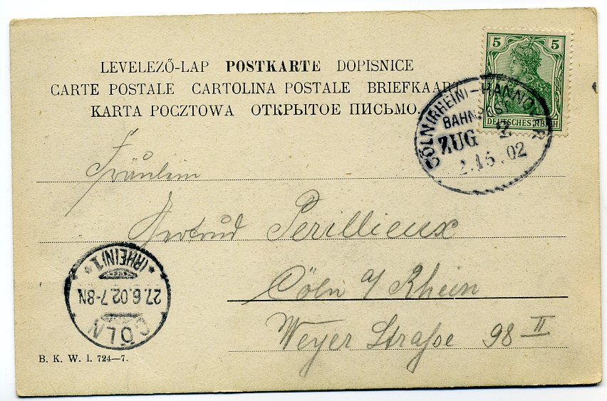 Postkarte